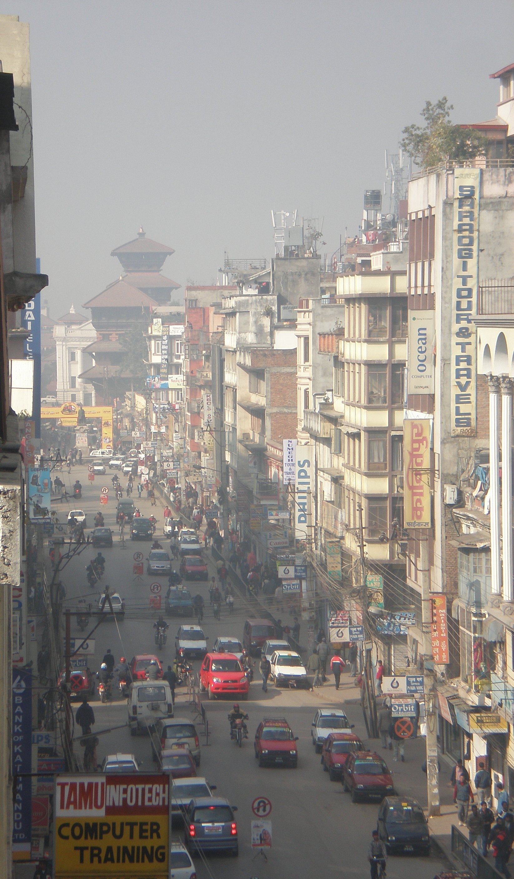 येँयागु न्हुसतकयागु किपा